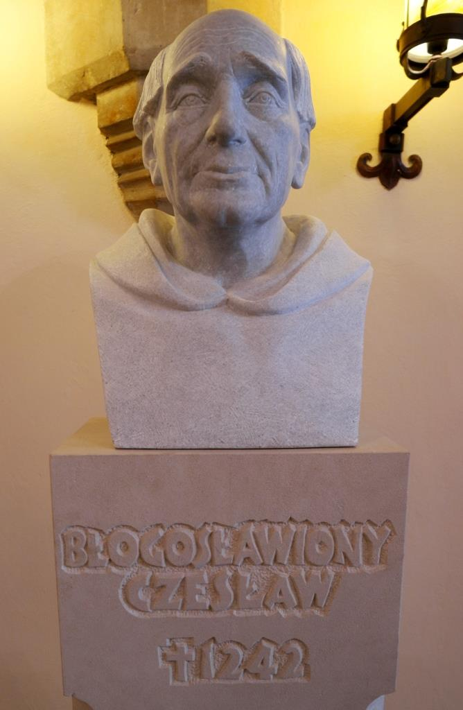 Büste des Juristen und Missionars Ceslaus von Breslau (polnisch: Czesław Odrowąż), um 1184 bis 1242, im Rathaus von Breslau